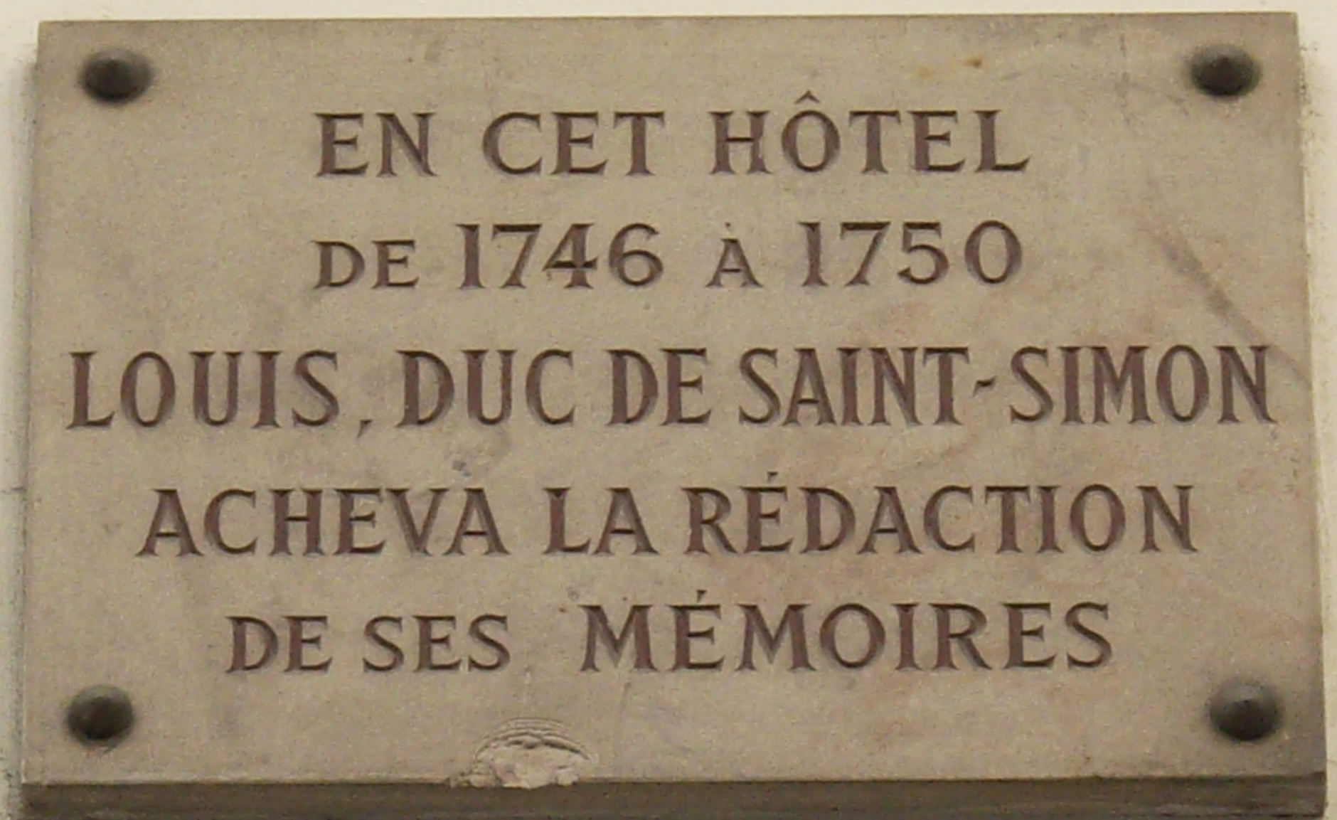 Plaque apposée au n° 17 de la rue Cherche-Midi, Paris 6e, où Louis de Rouvroy, duc de Saint-Simon (1675-1765) acheva de rédiger ses Mémoires de 1746 à 1750.